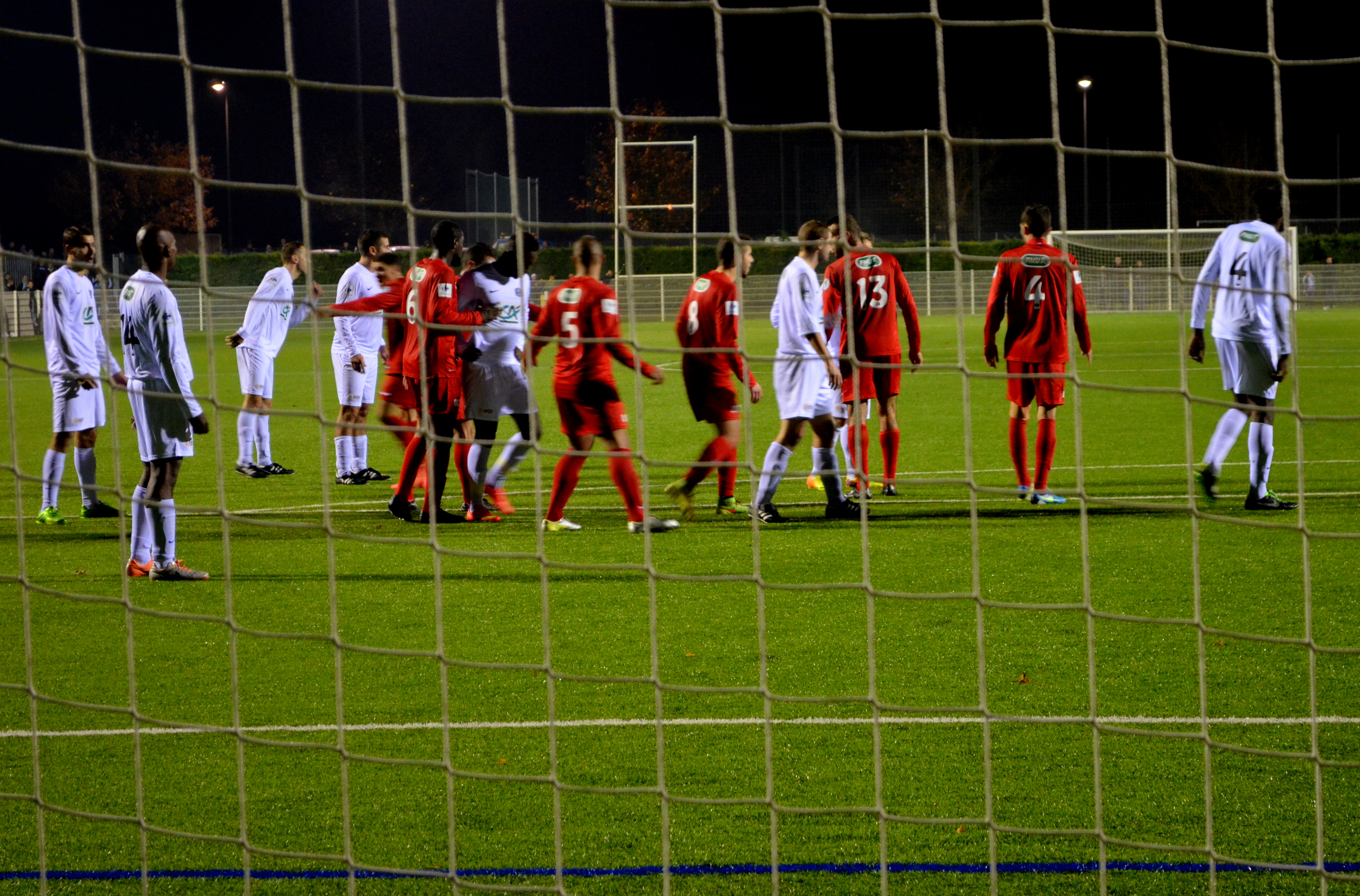 Septième tour de la coupe de France 2014-2015 entre Ain Sud Foot et La Duchère : score final, 3-4.